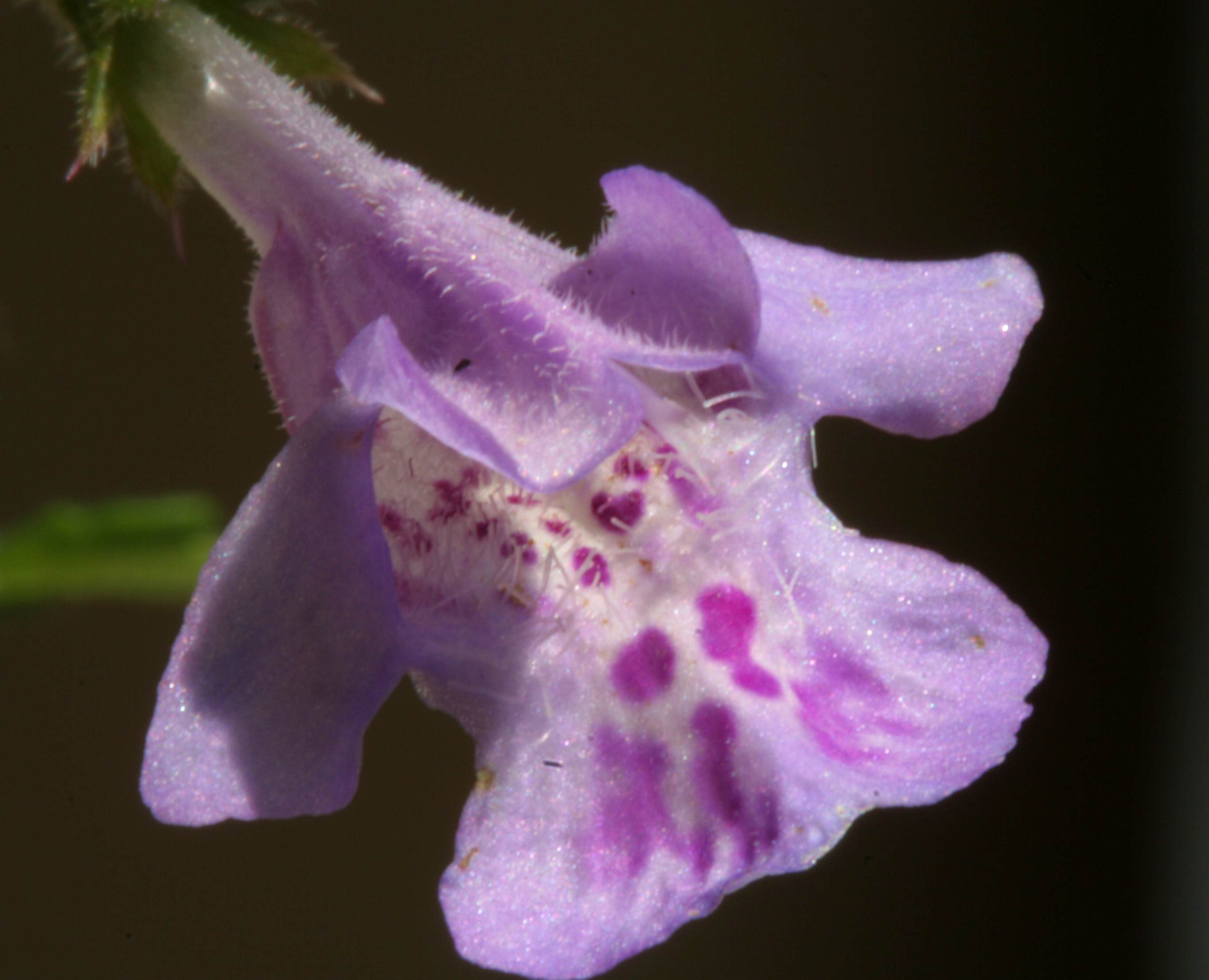 Glechoma_hederacea (Ellera terrestre comune Località: Villa Prima, Limana (BL), 350 m s.l.m.